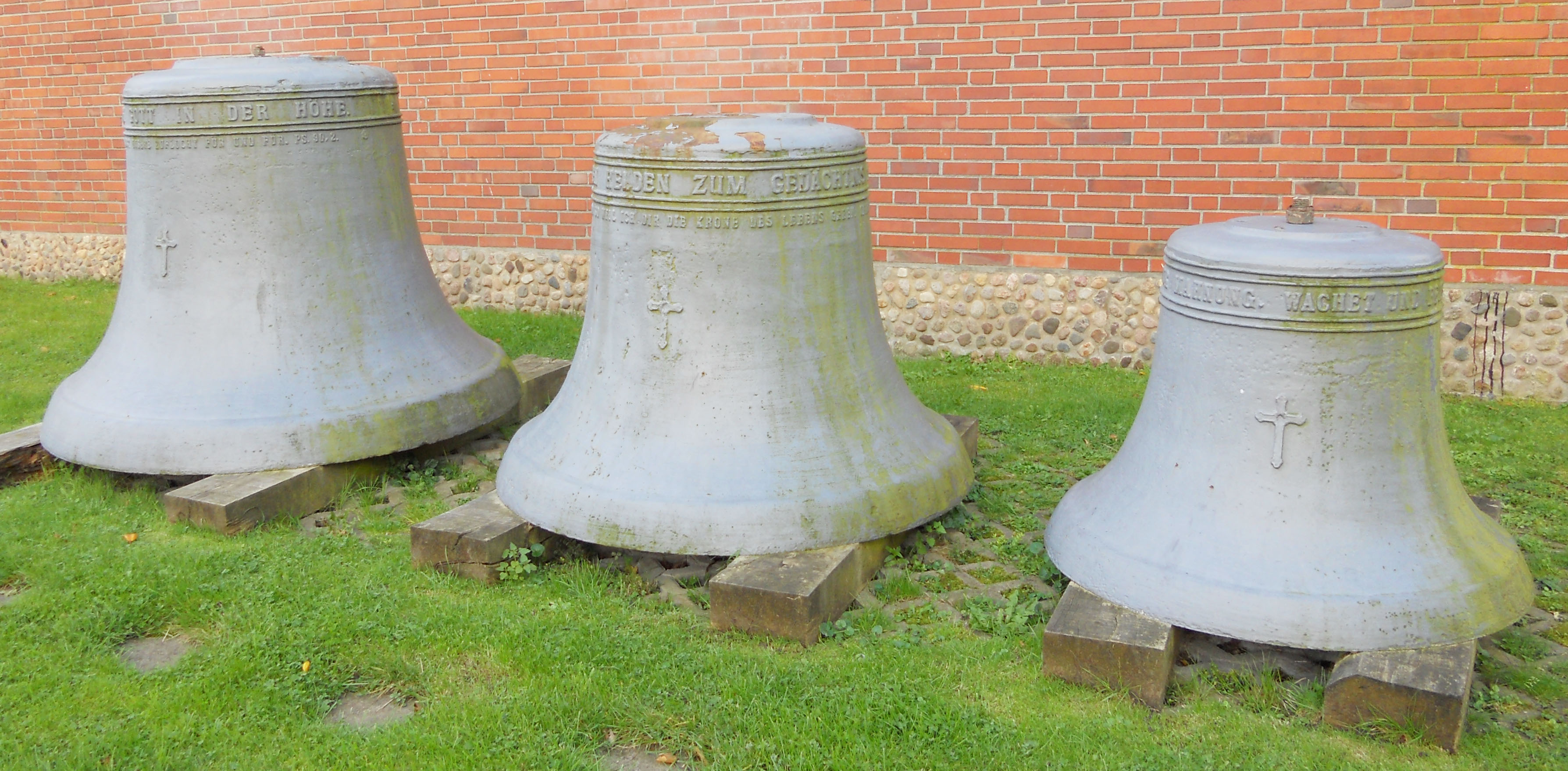 Glücksburg evangelische Kirche Glocken